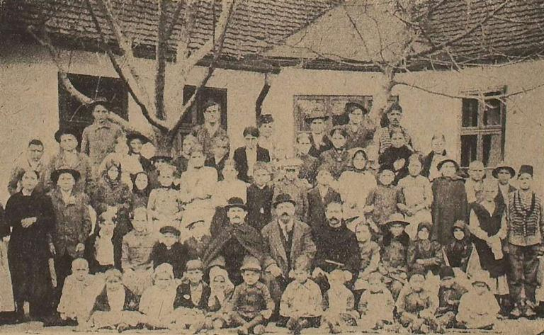 Bosansko-hercegovačka djeca u Donjem Miholjcu (Ilustrovani list, 1918., br.10, str. 149)